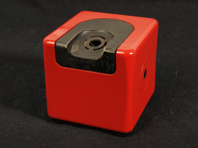 Tischfeuerzeug der Braun AG, T3 für Gas mit elektrischer Zündung